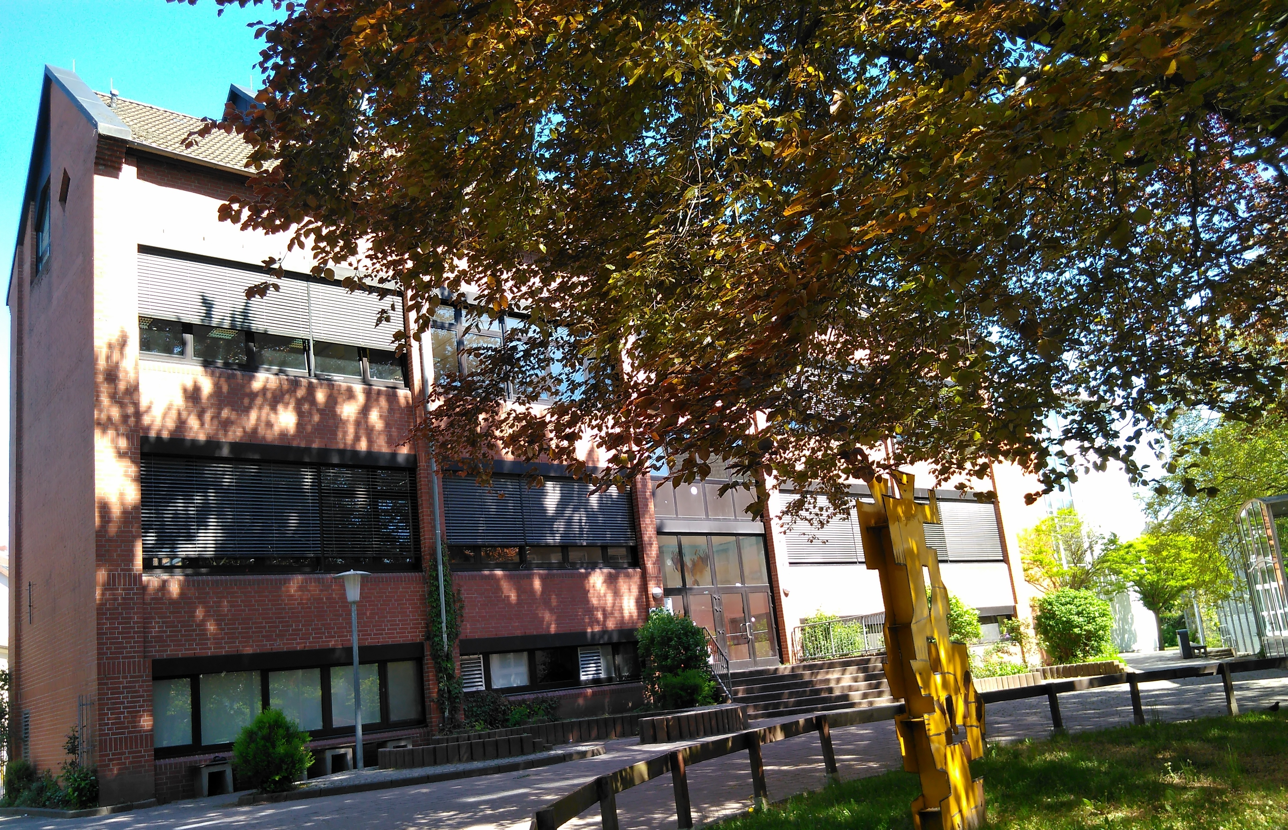 Gymnasium Christophorusschule im CJD Braunschweig (E/F-Gebäude)